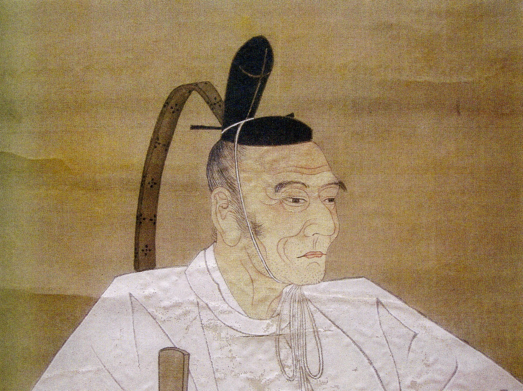 半家萩原家初代当主・萩原兼従の肖像画(部分)。